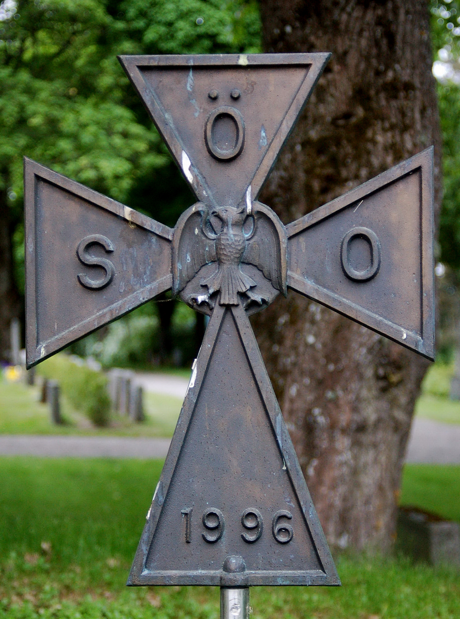 Kors rest 1996 av Svarta Örns Orden vid Mosjö Kyrka för att befästa Ordens veksamhet och starka förankring i Sverige